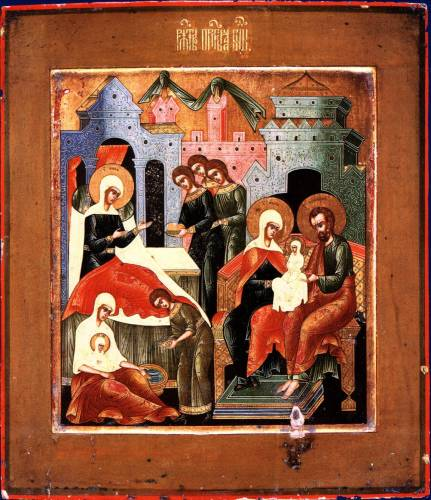 Рождество Богородицы. Мстера